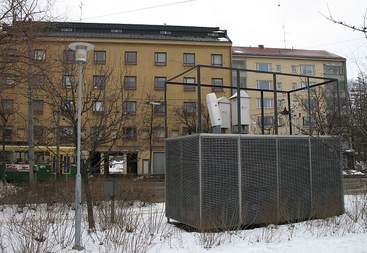 YTV:n eli nykyisen HSY:n (Helsingin seudun ympäristöpalvelut) Helsingin Hämeentien ilmanlaatuasema keväällä 2007. Huom: Muista säilyttää viittaus kuvaajaan, mikäli käytät kuvaa.